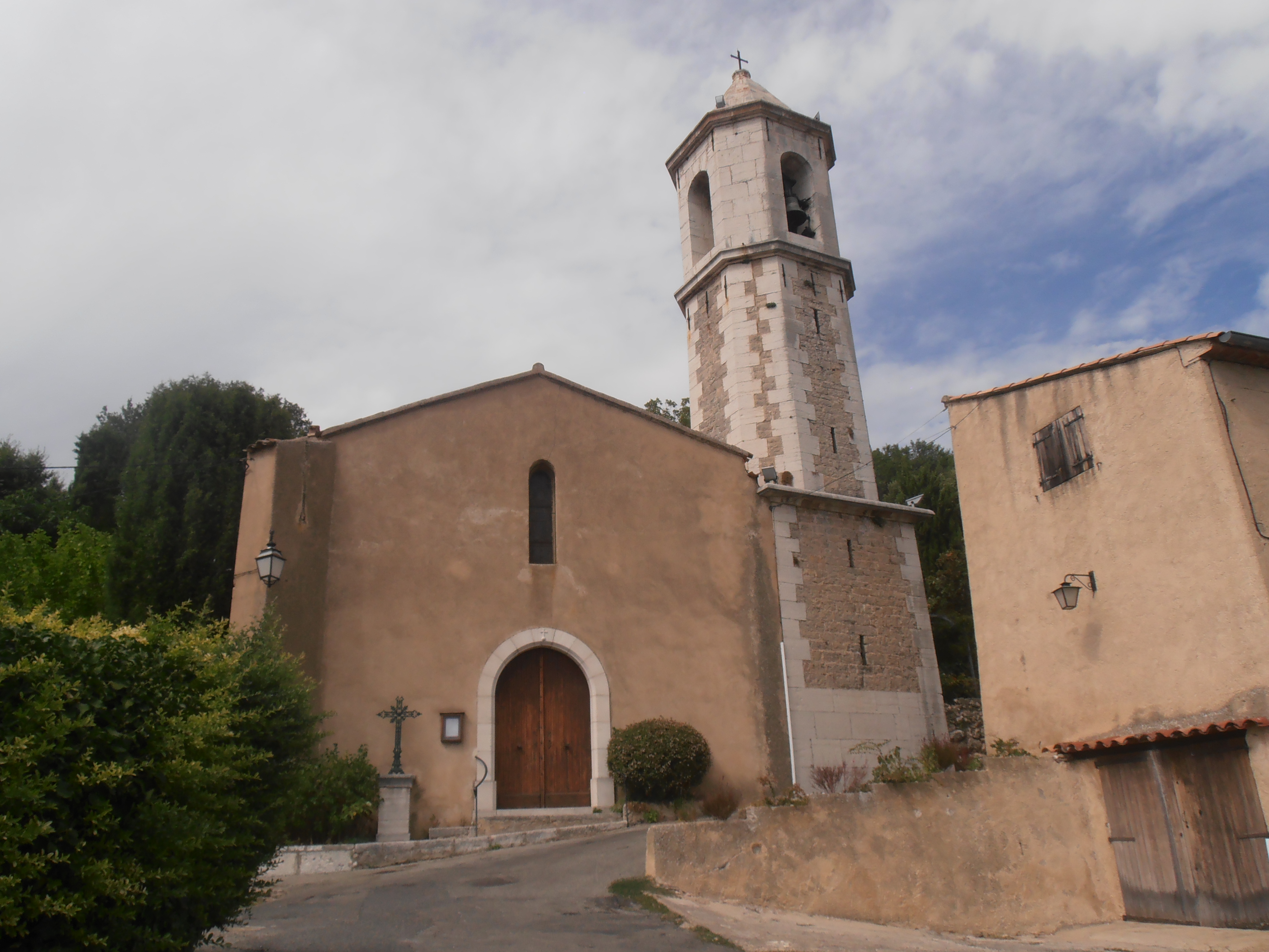 Var, Moissac-Bellevue, Eglise et clocher du village